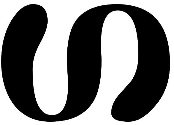 ഗ അക്ഷരം